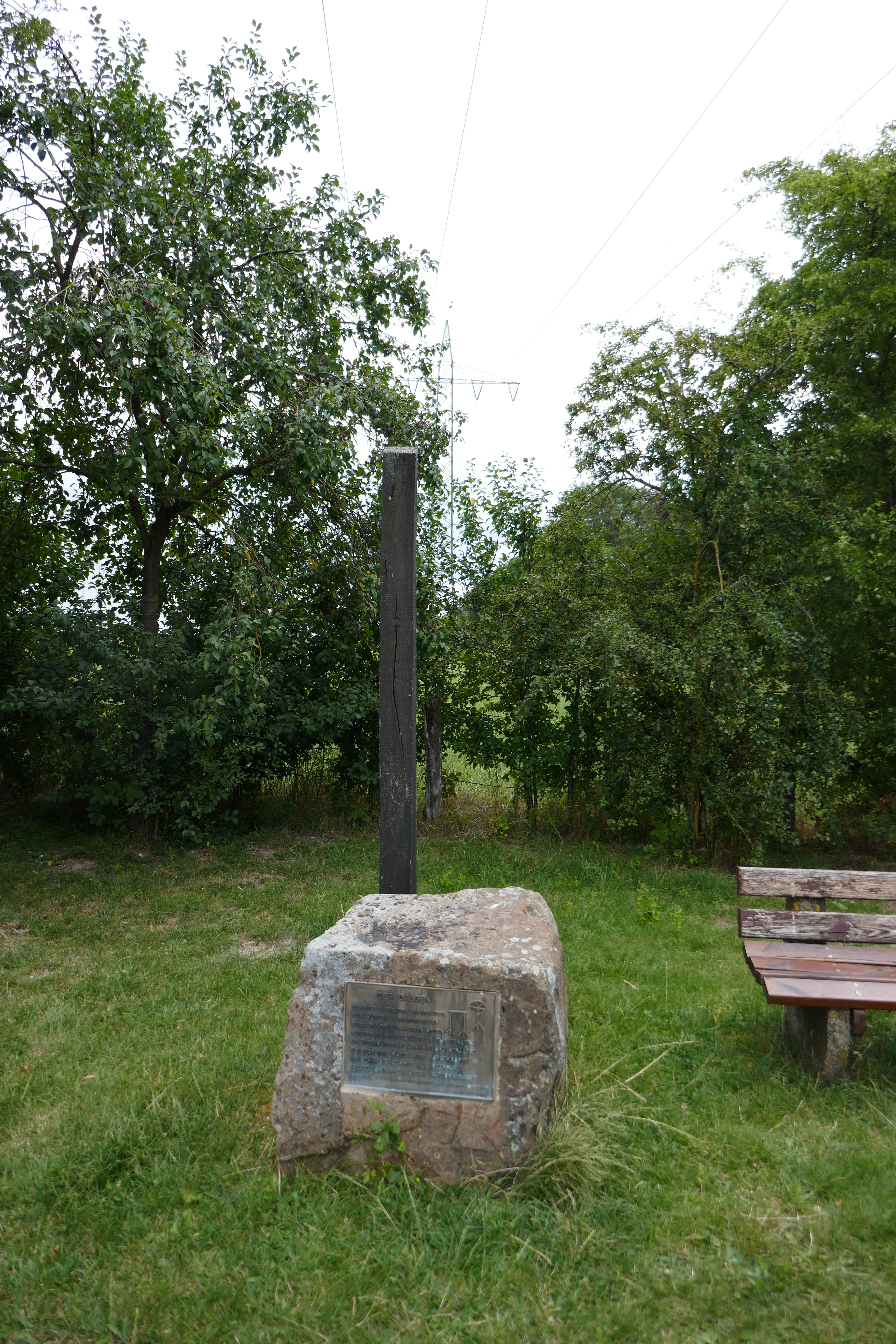 Richtstätte des Sintfelds am Grasweg, Bad Wünnenberg